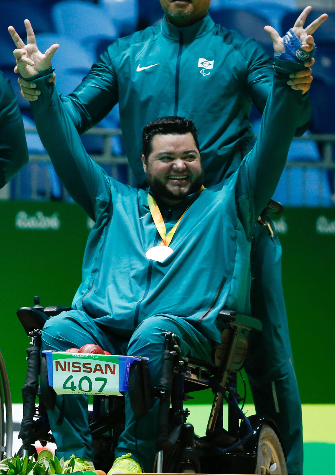 Rio de Janeiro - Brasileiros ficam com medalha de prata após derrota para Eslováquia na final da bocha BC4 nos Jogos Paralímpicos Rio 2016 (Fernando Frazão/Agência Brasil)